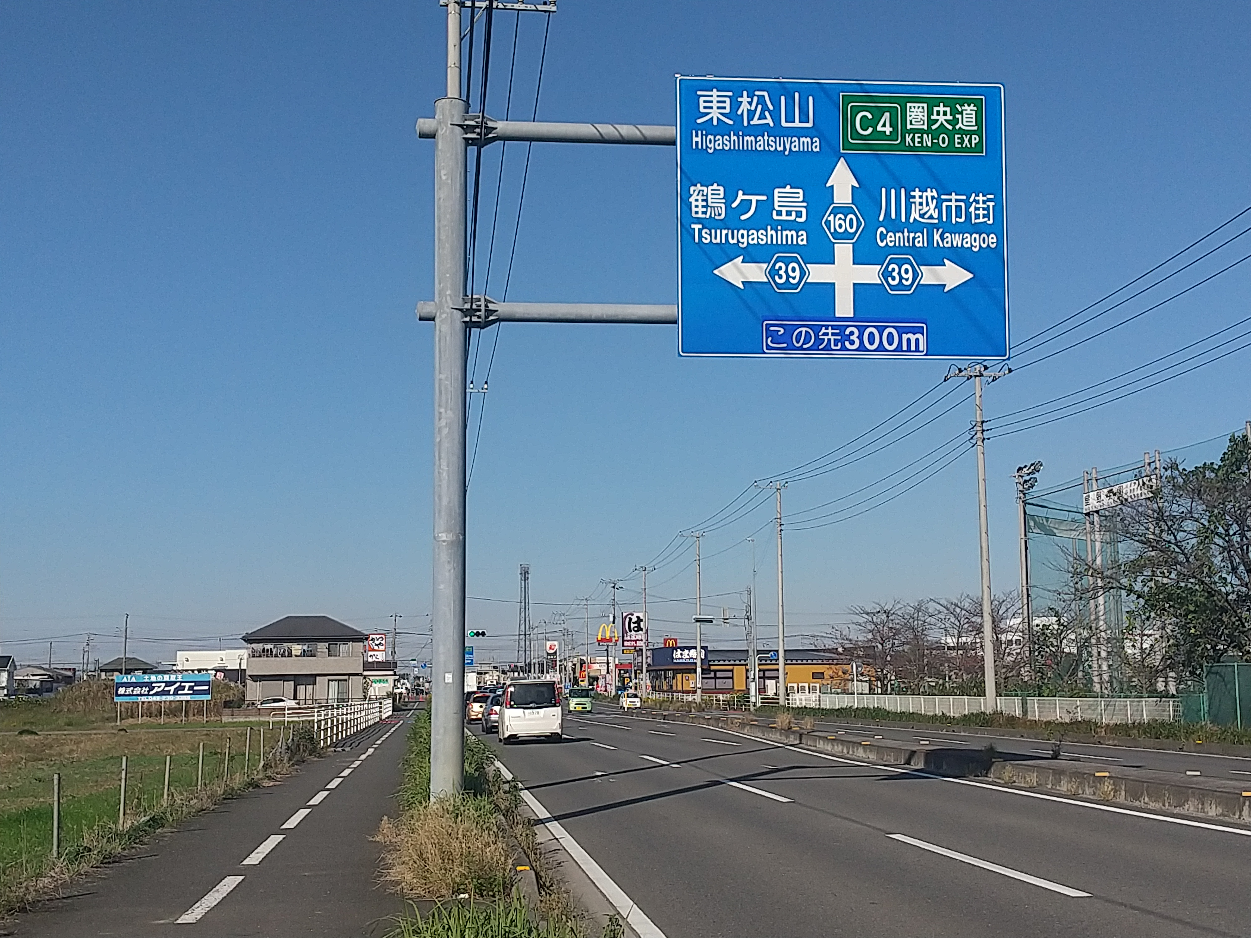 埼玉県道160号線川越市上寺山付近（国道254号線方面を撮影）